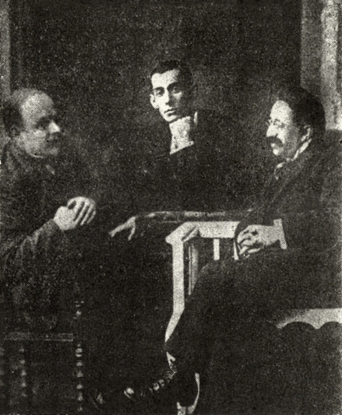 Od prawej: Dawid Frischmann, Zusman Segałowicz i Chajim Nachman Bialik. Odessa, 1916